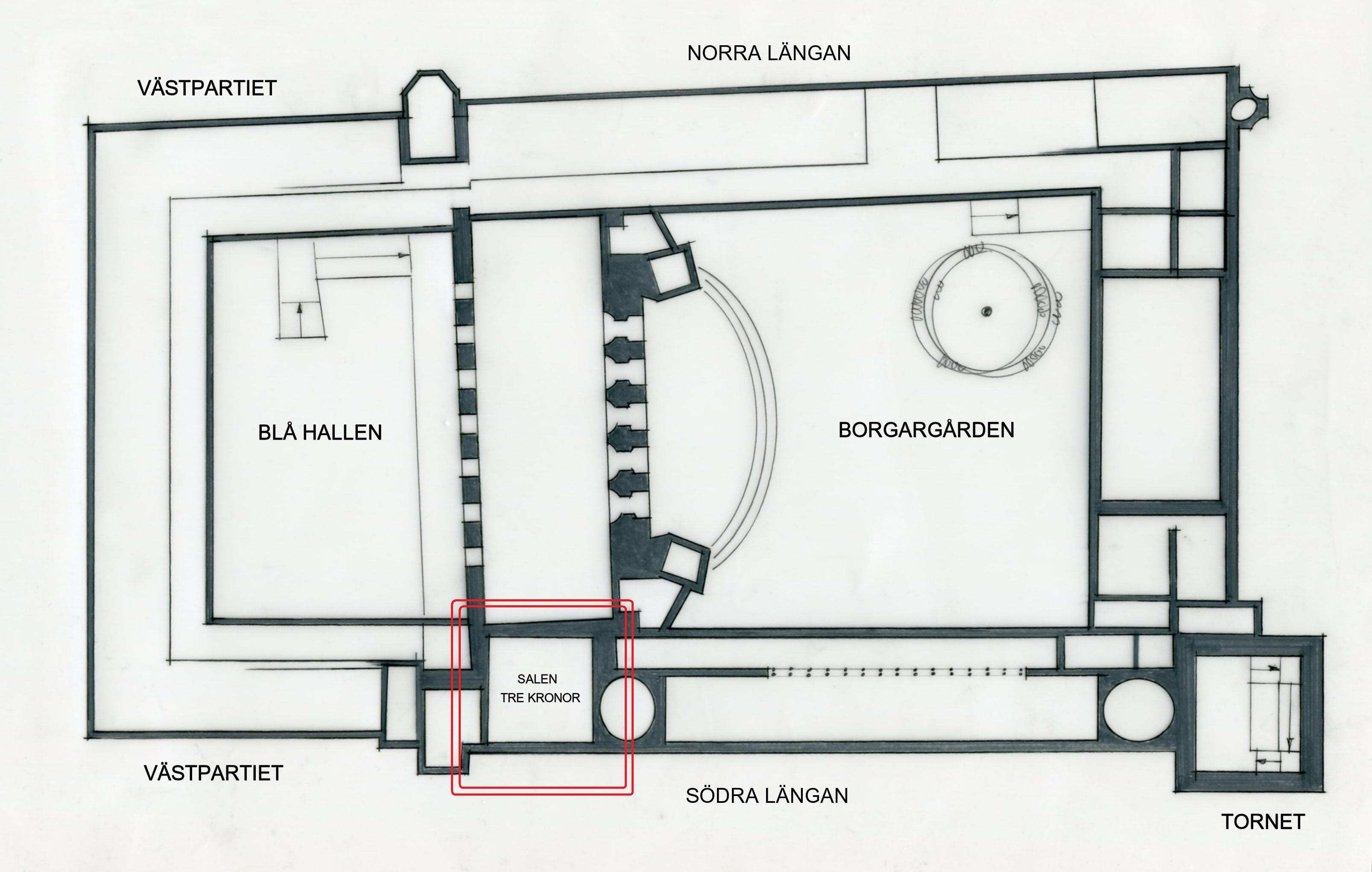 Stockholms stadshus översiktsplan våning 1 trappa, Salen Tre kronor